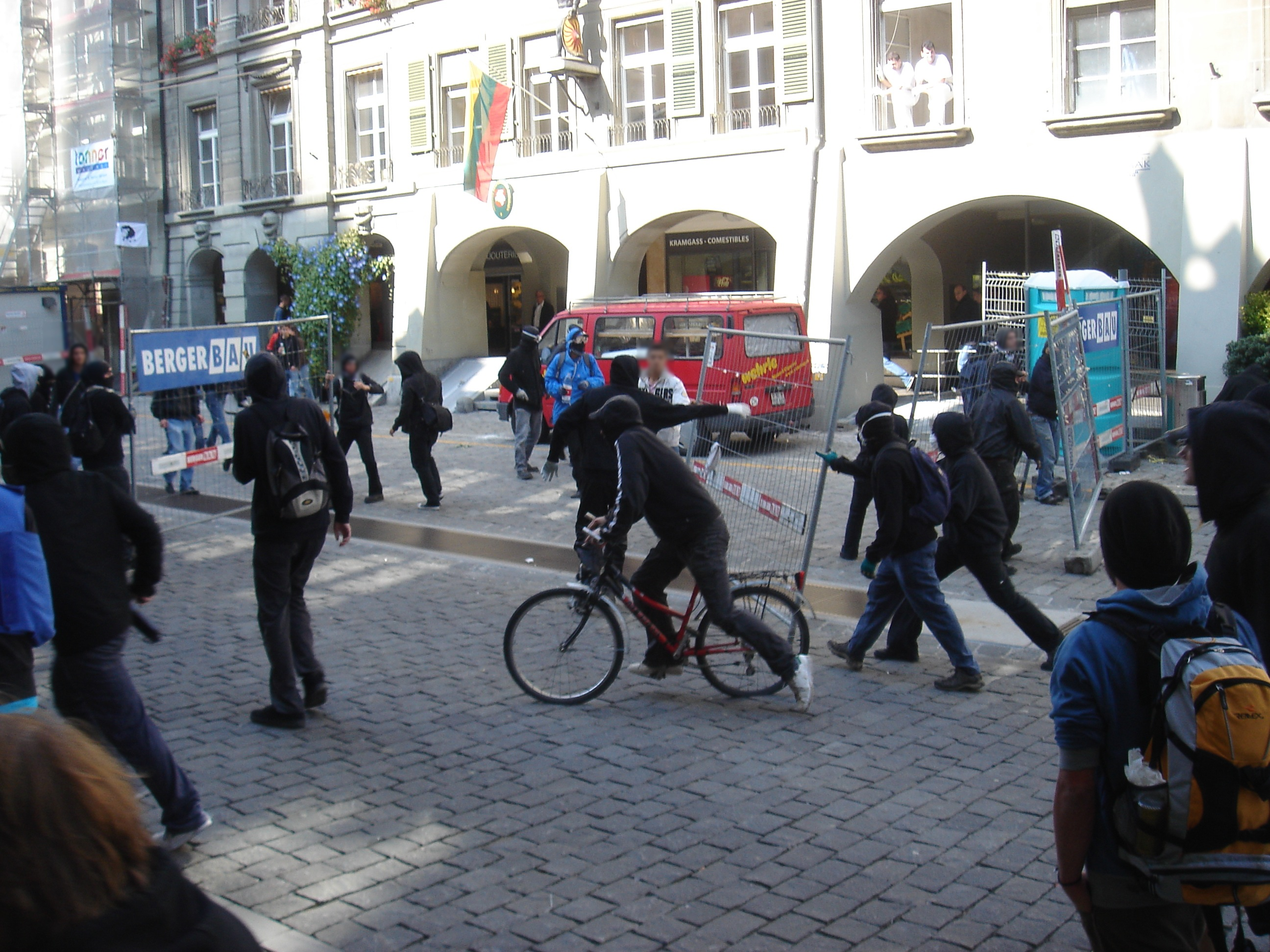 Kravalle in der Marktgasse an der SVP Demonstration